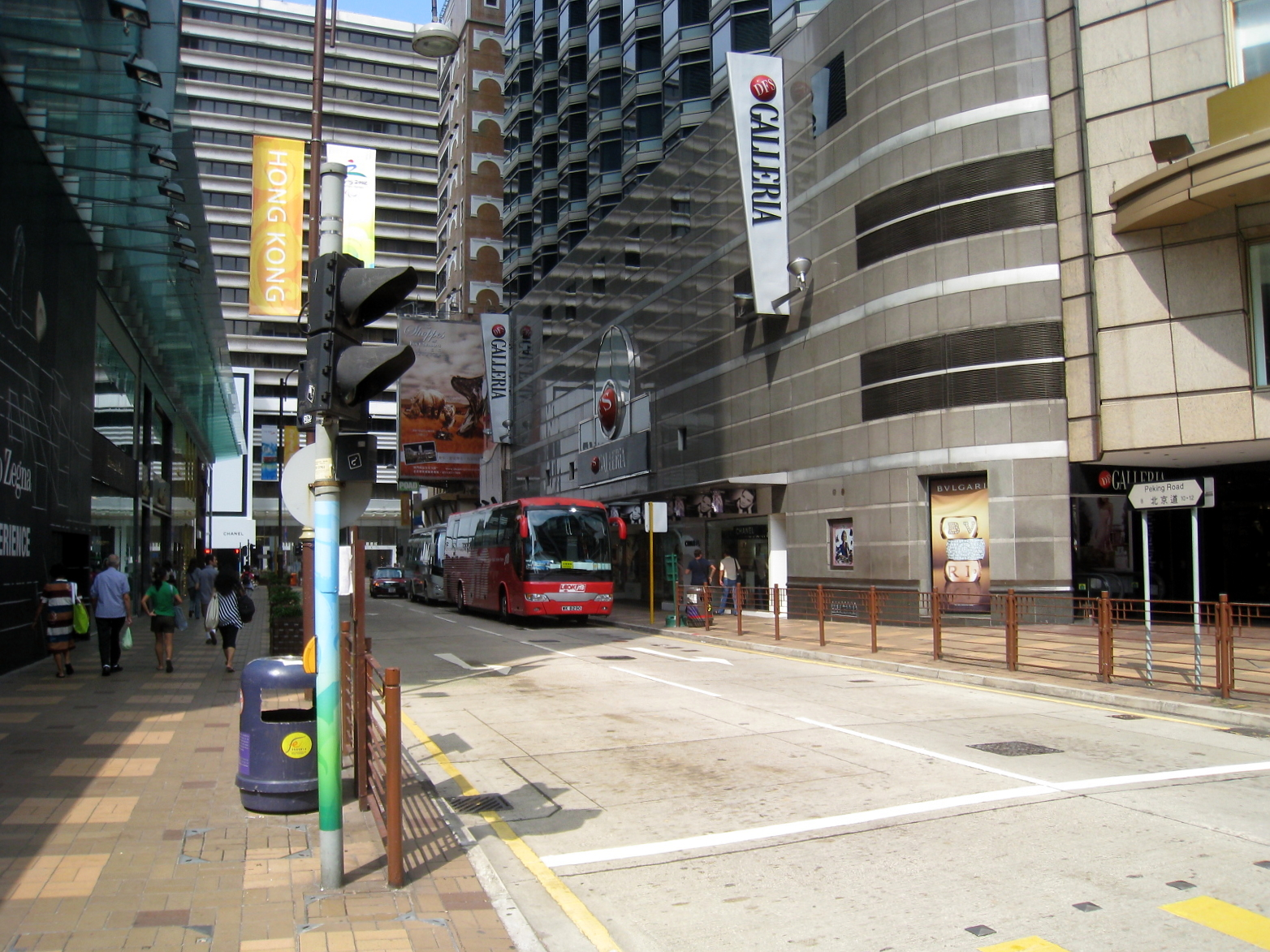 HK Peking Road 北京道